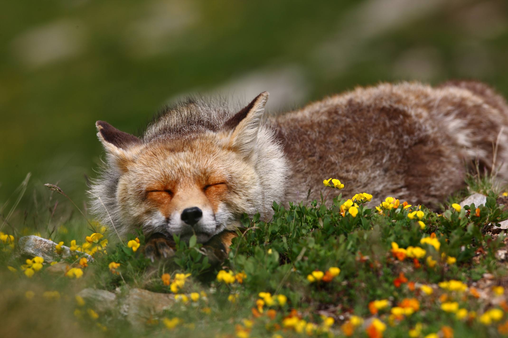 Parco nazionale del Gran Paradiso (Q847690)